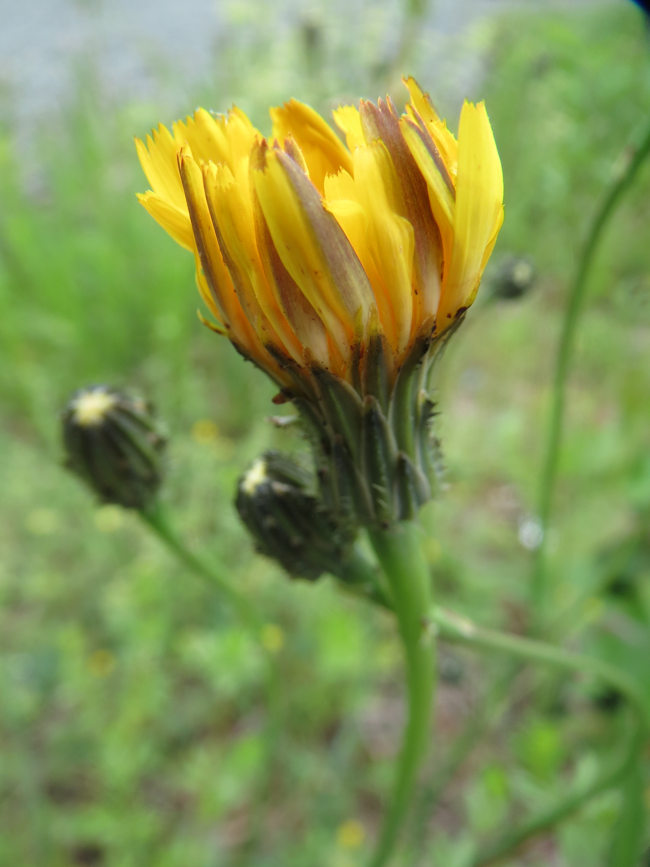 Gewöhnliches Ferkelkraut (Hypochaeris radicata) in Bruchmühlbach-Miesau